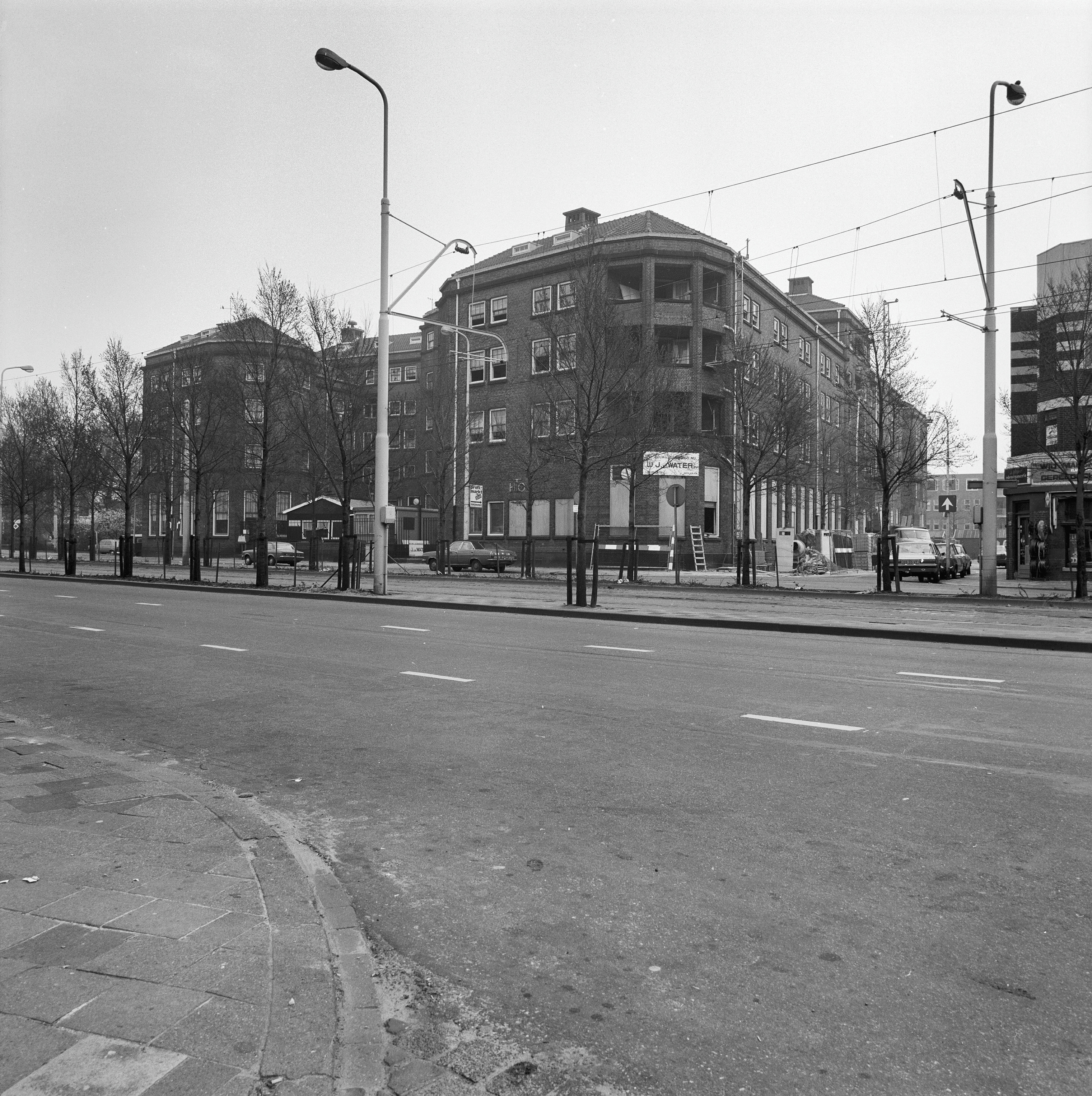 Rijswijkseweg/Rijswijkseplein: H.T.O., zij- en achtergevel